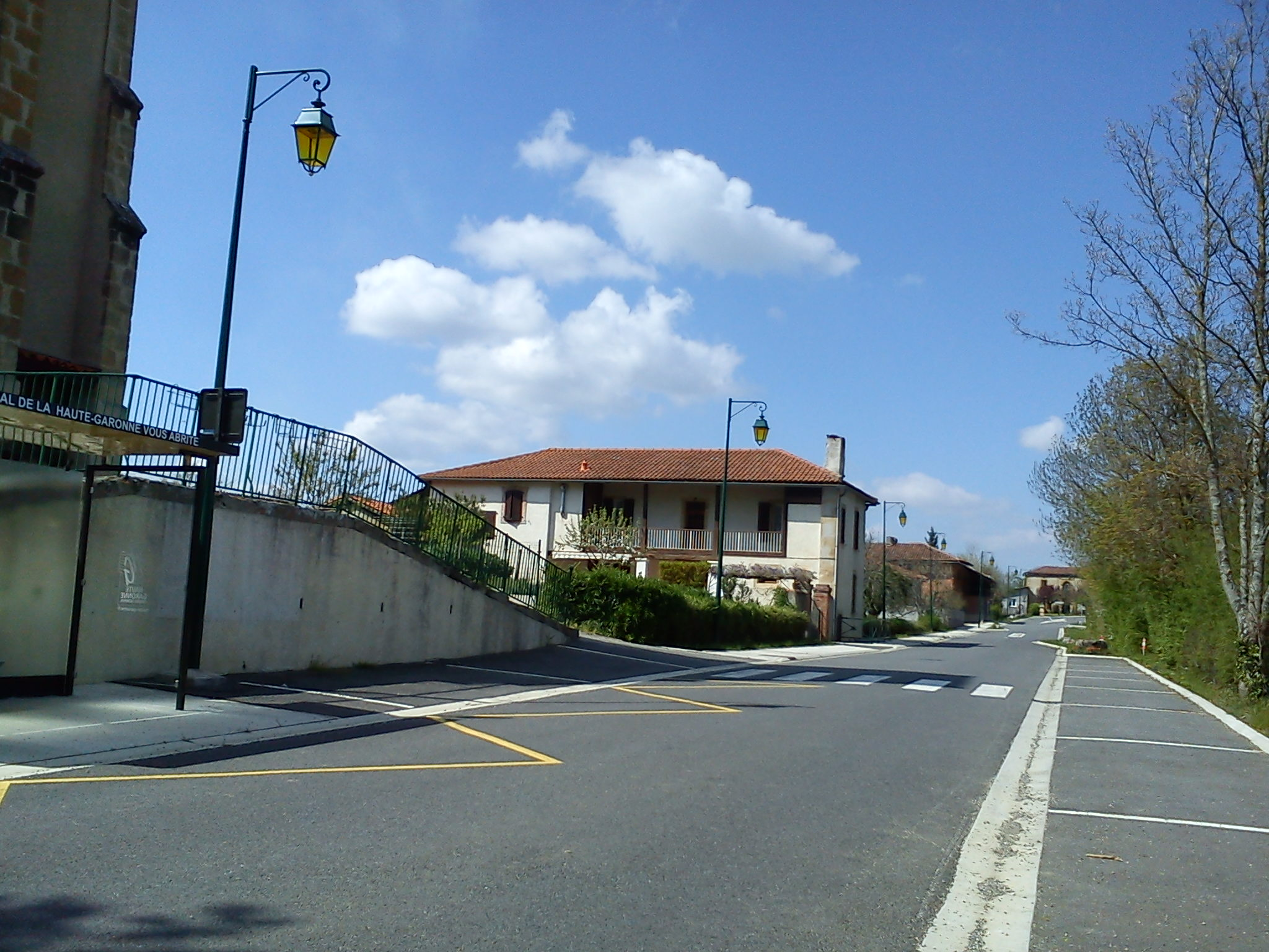 Lilhac